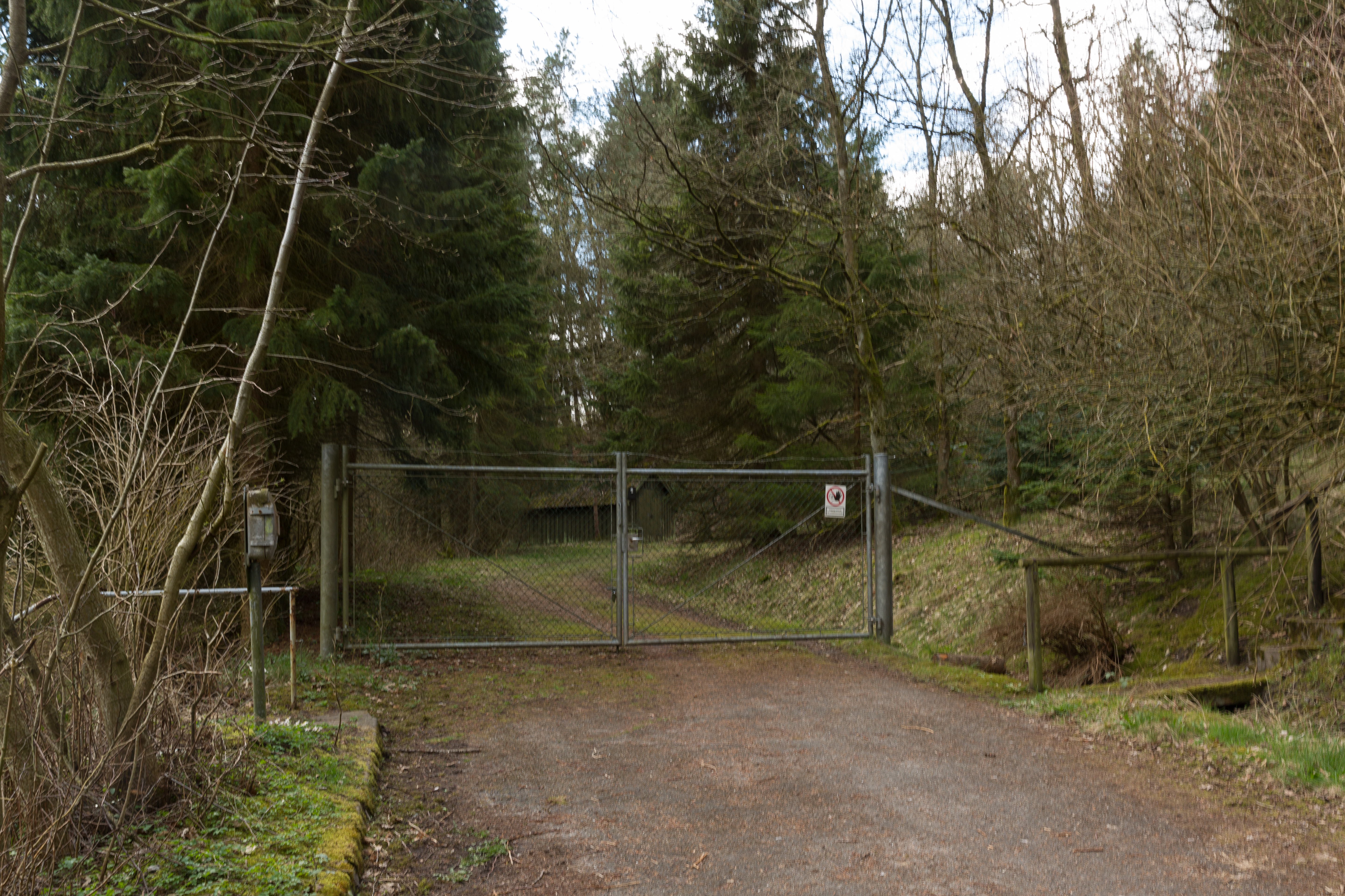 Indgang til regan vest